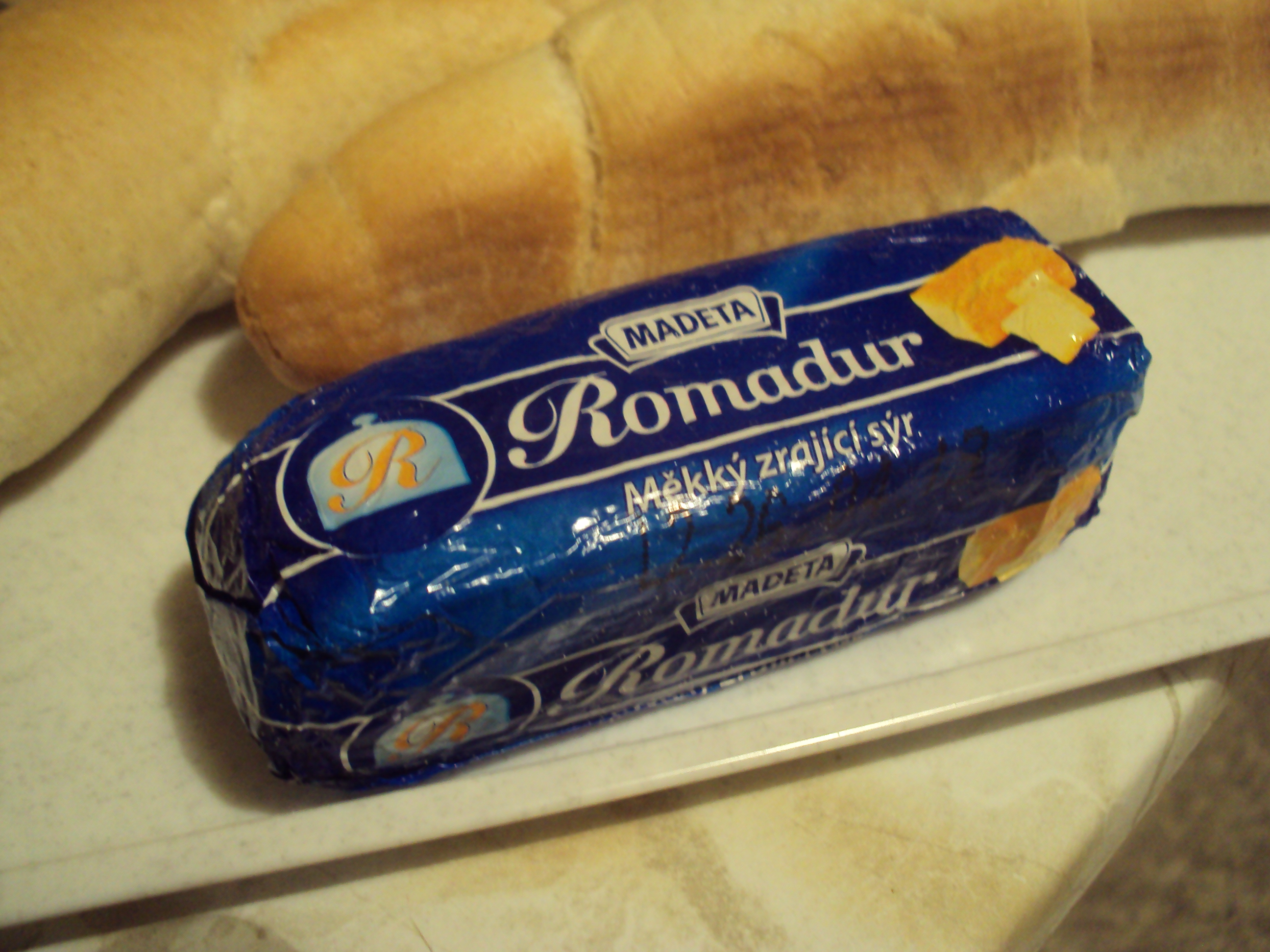 Sýr Romadur od fa Madeta